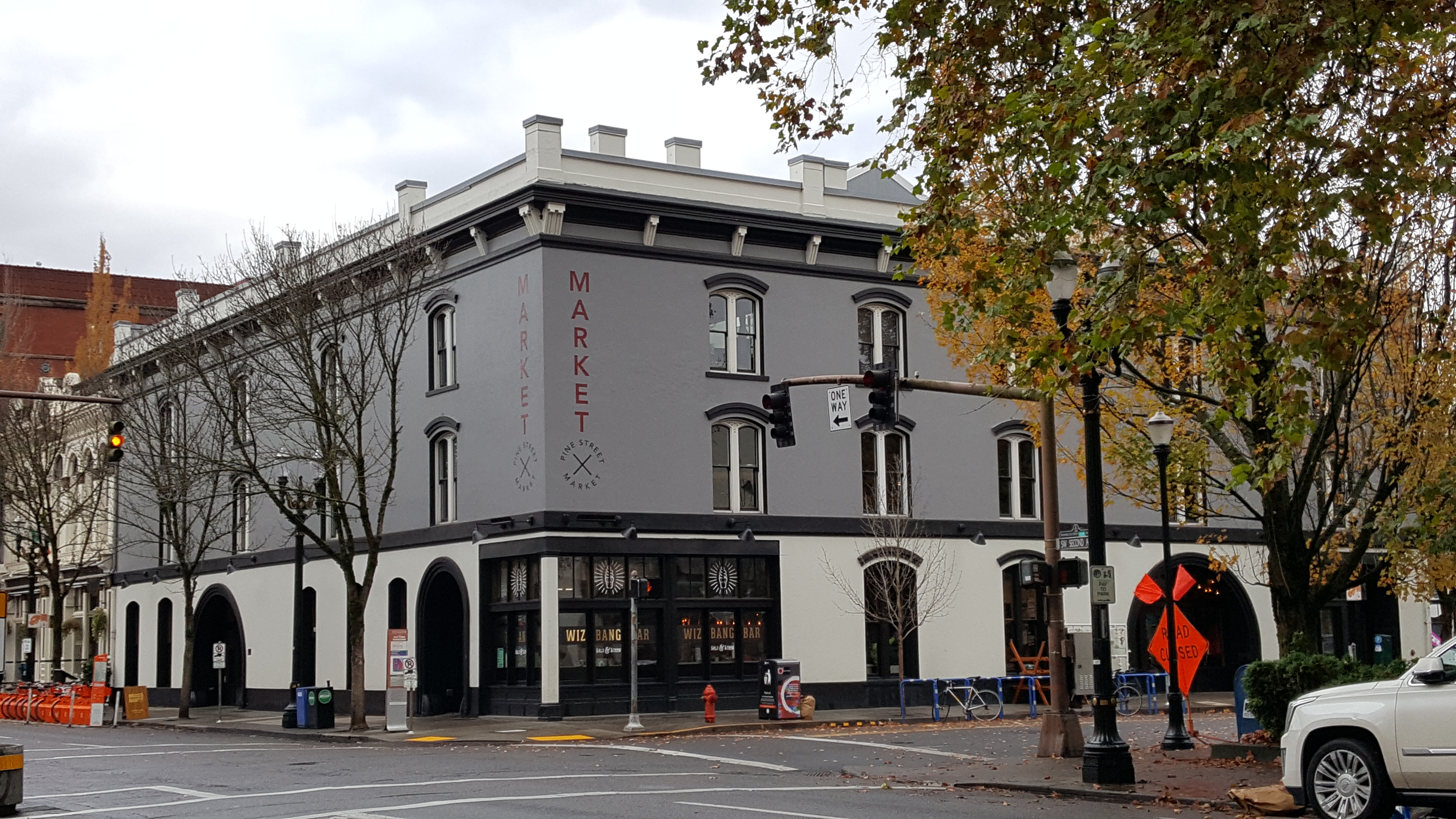 Pine Street Market